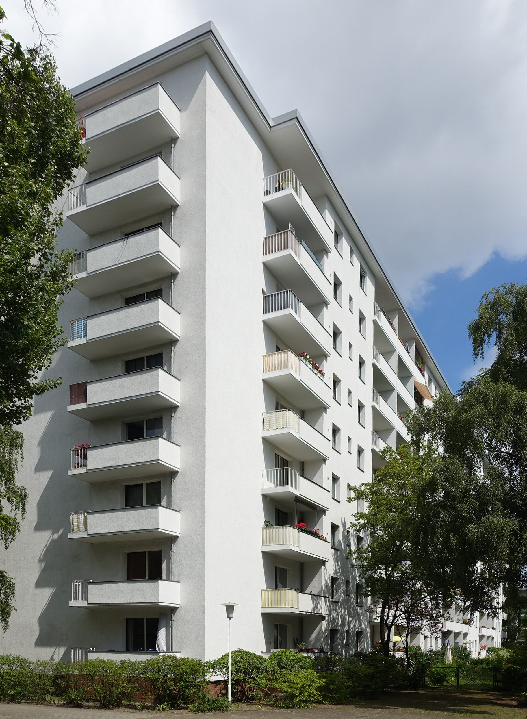 Scheibenwohnhaus